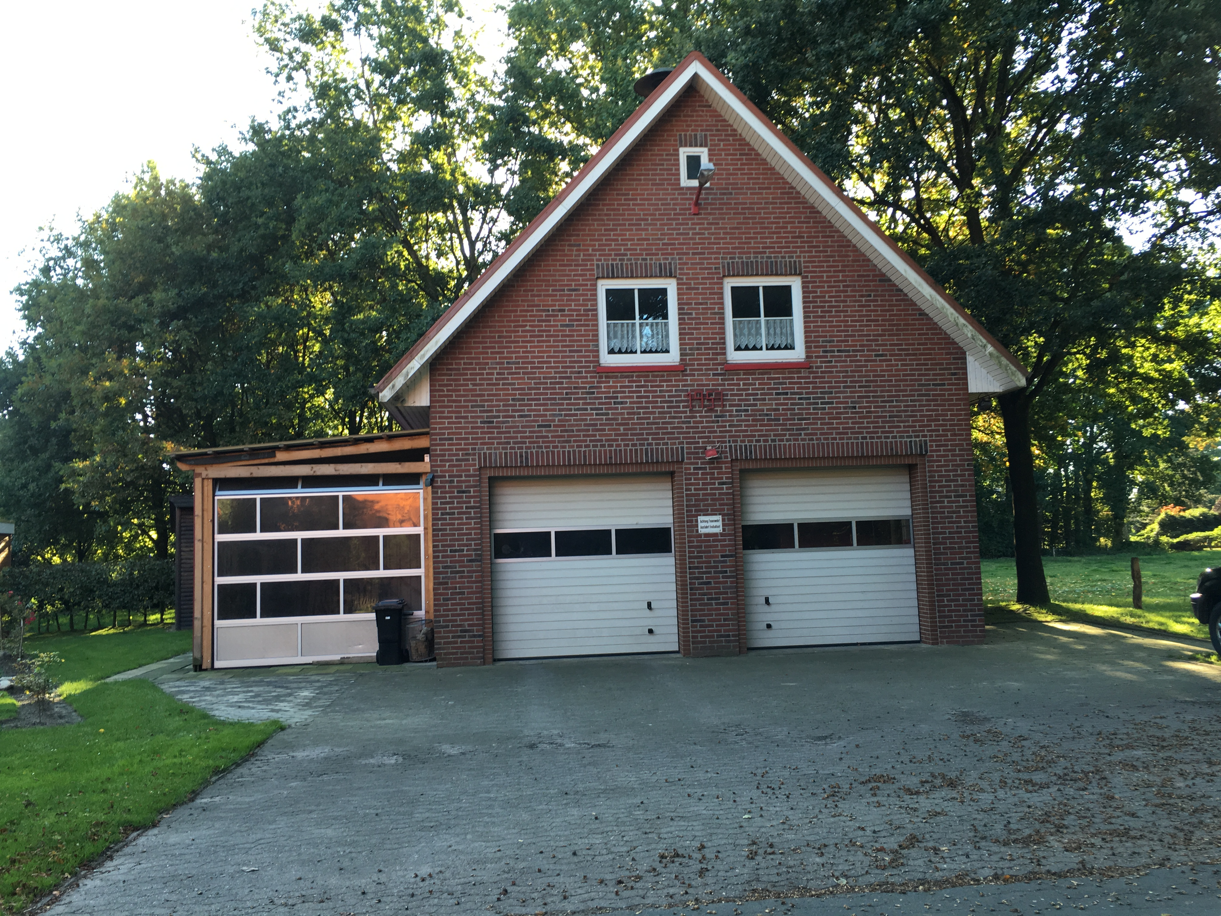 Sprüttenhuus von Alfst